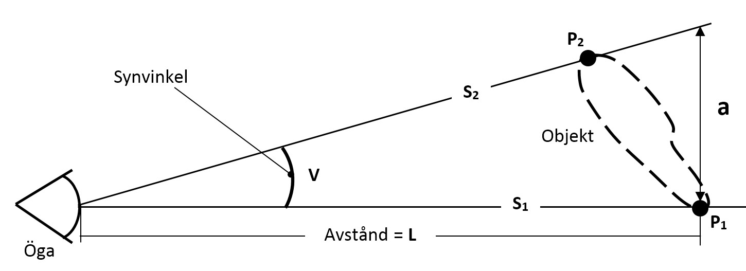 Synvinkel